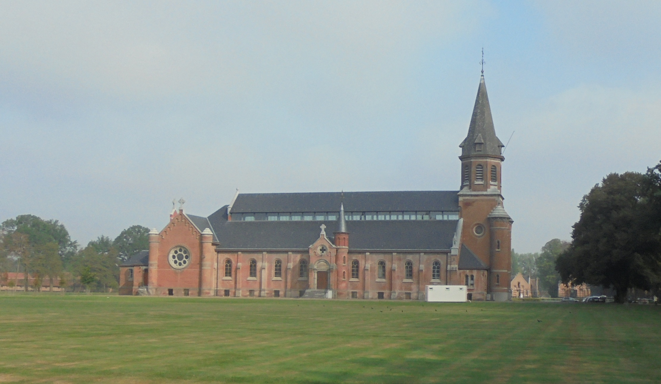 Kapel Onze-Lieve-Vrouw Hemelvaart - Merksplas Kolonie - provincie Antwerpen - België